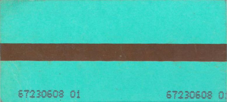 Ticket t du métro de Paris - verso (cca 1998)